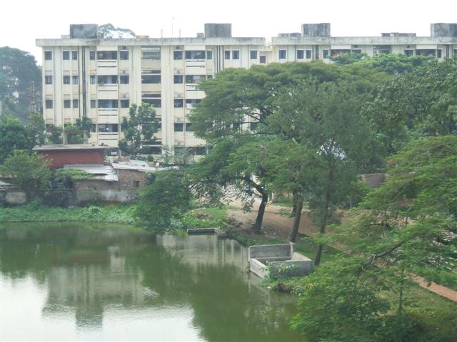 Azimpur Colony, Dhaka, Bangladesh